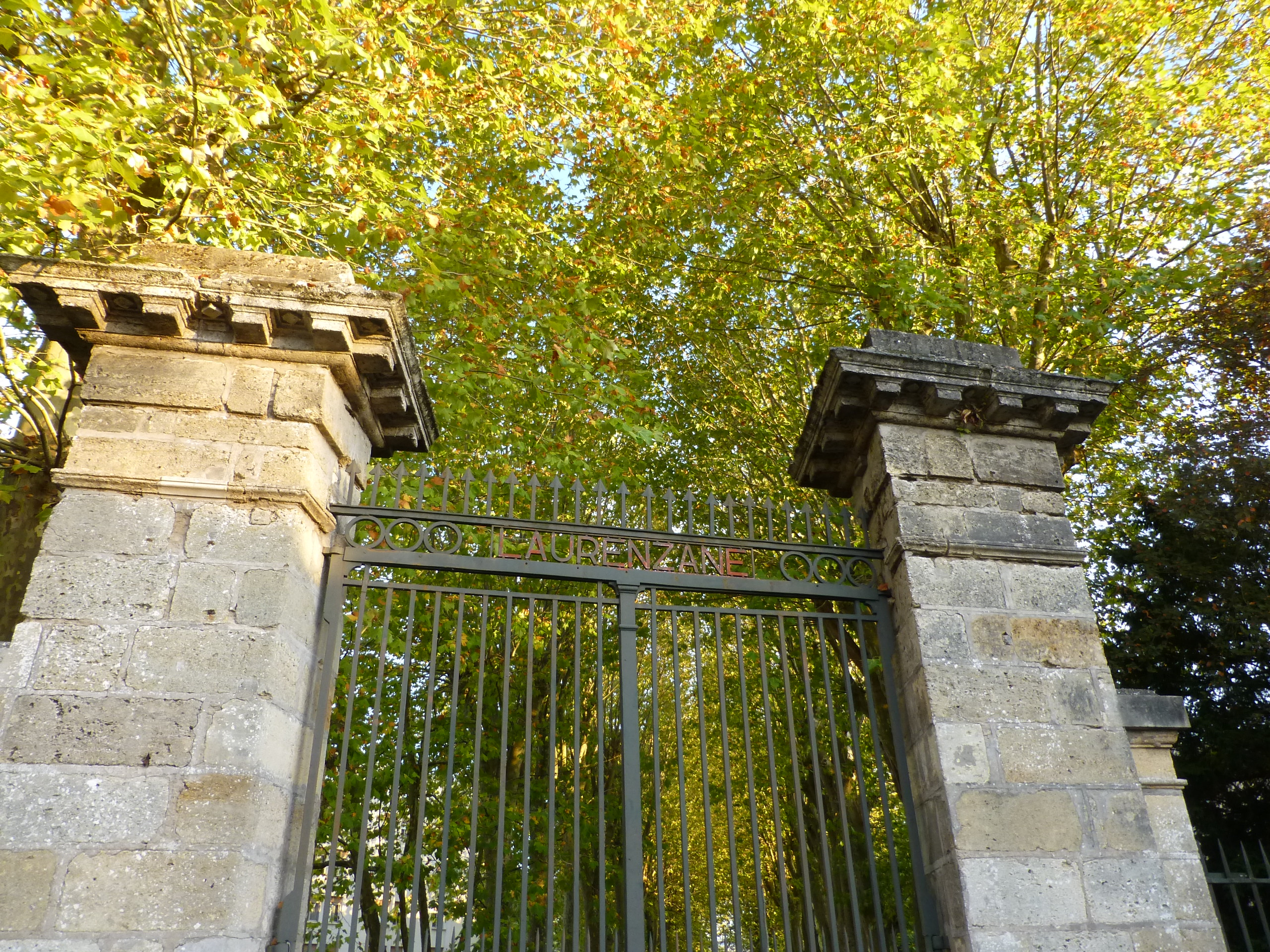 Gradignan, Portail de la Résidence du Château de Laurenzanne